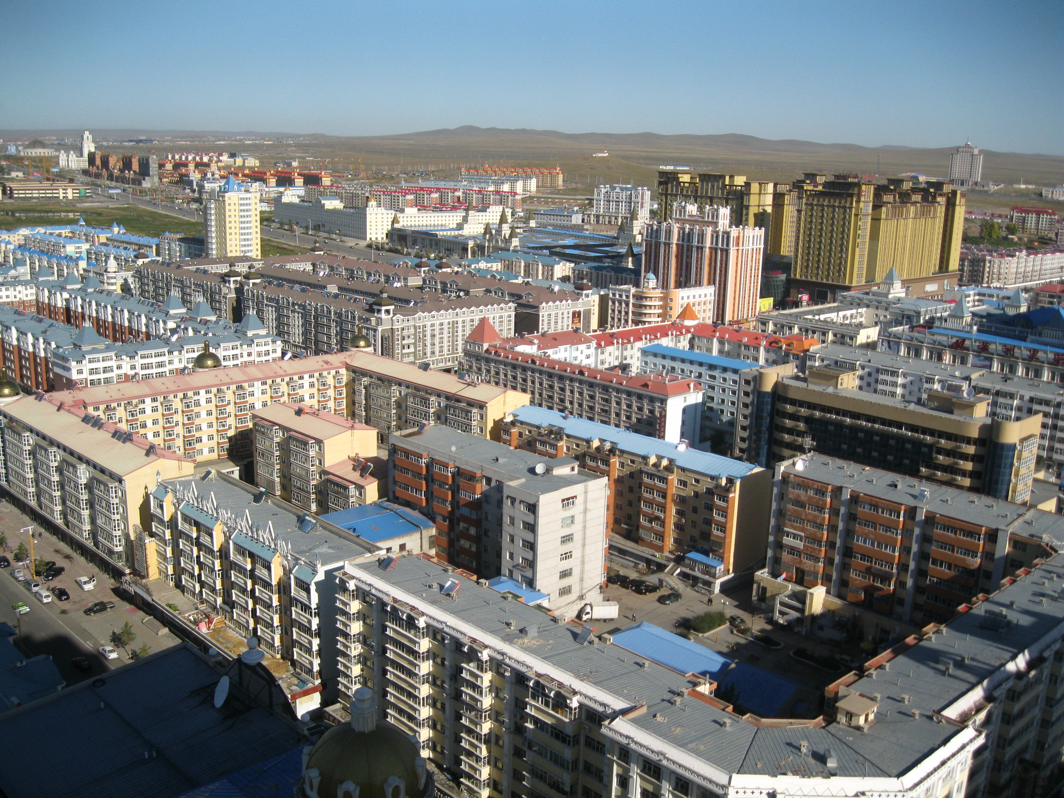 Вид на Маньчжурию с птичьего полёта, Китай